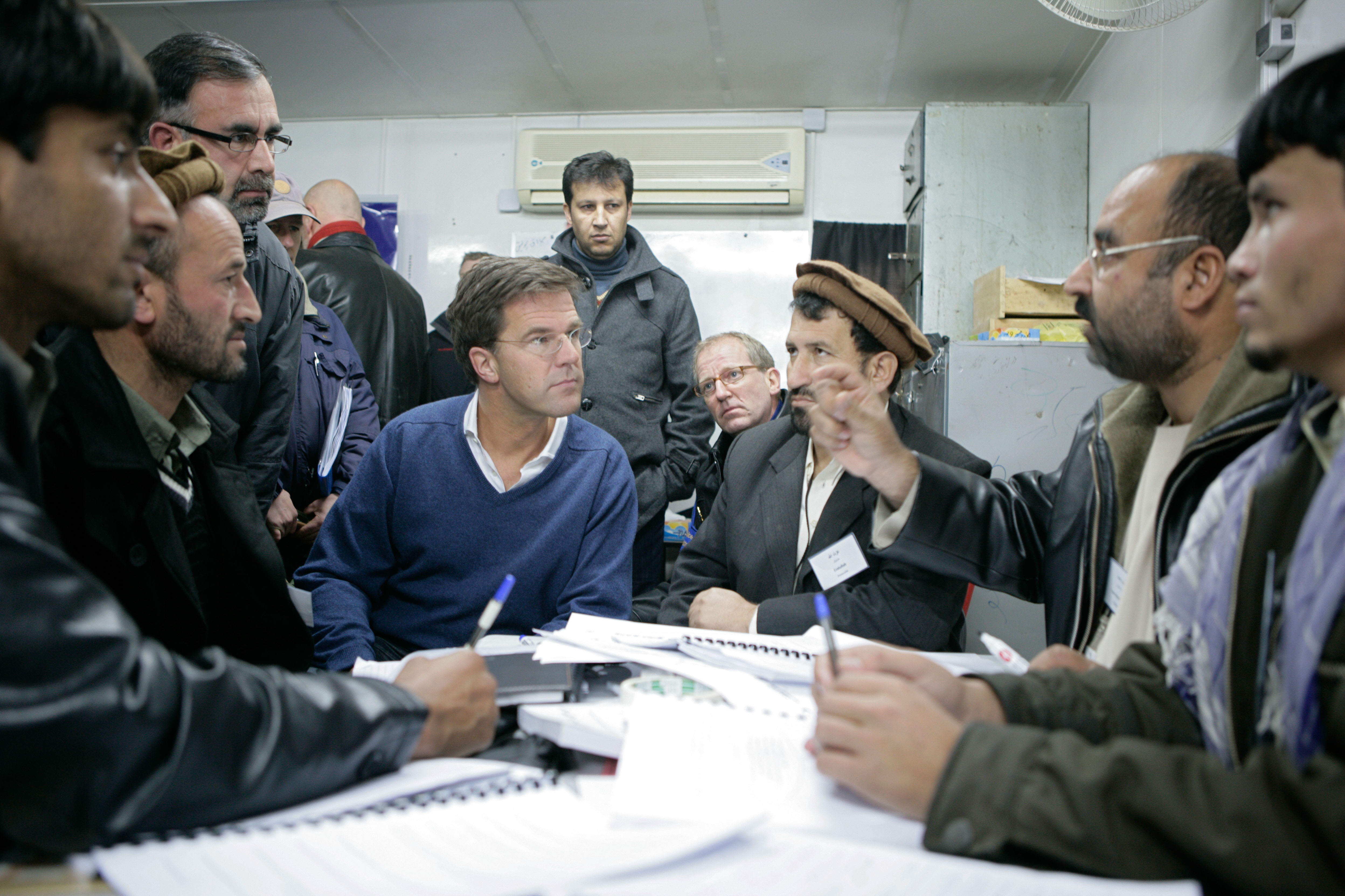 Minister-president Rutte bezoekt de Nederlandse Politietrainingsmissie in Afghanistan. Hij ontmoet onder andere Nederlandse trainers en mentoren van de Afghaanse politie, militairen en civiele experts. Met hen bezoekt hij bijvoorbeeld het politietrainingscentrum in Kunduz waar Afghaanse agenten worden opgeleid. Door de weersomstandigheden kon er op het geplande tijdstip niet gevlogen worden en heeft de delegatie een nachtje extra op Kunduz doorgebracht. Meer informatie over de Nederlandse politietrainingsmissie